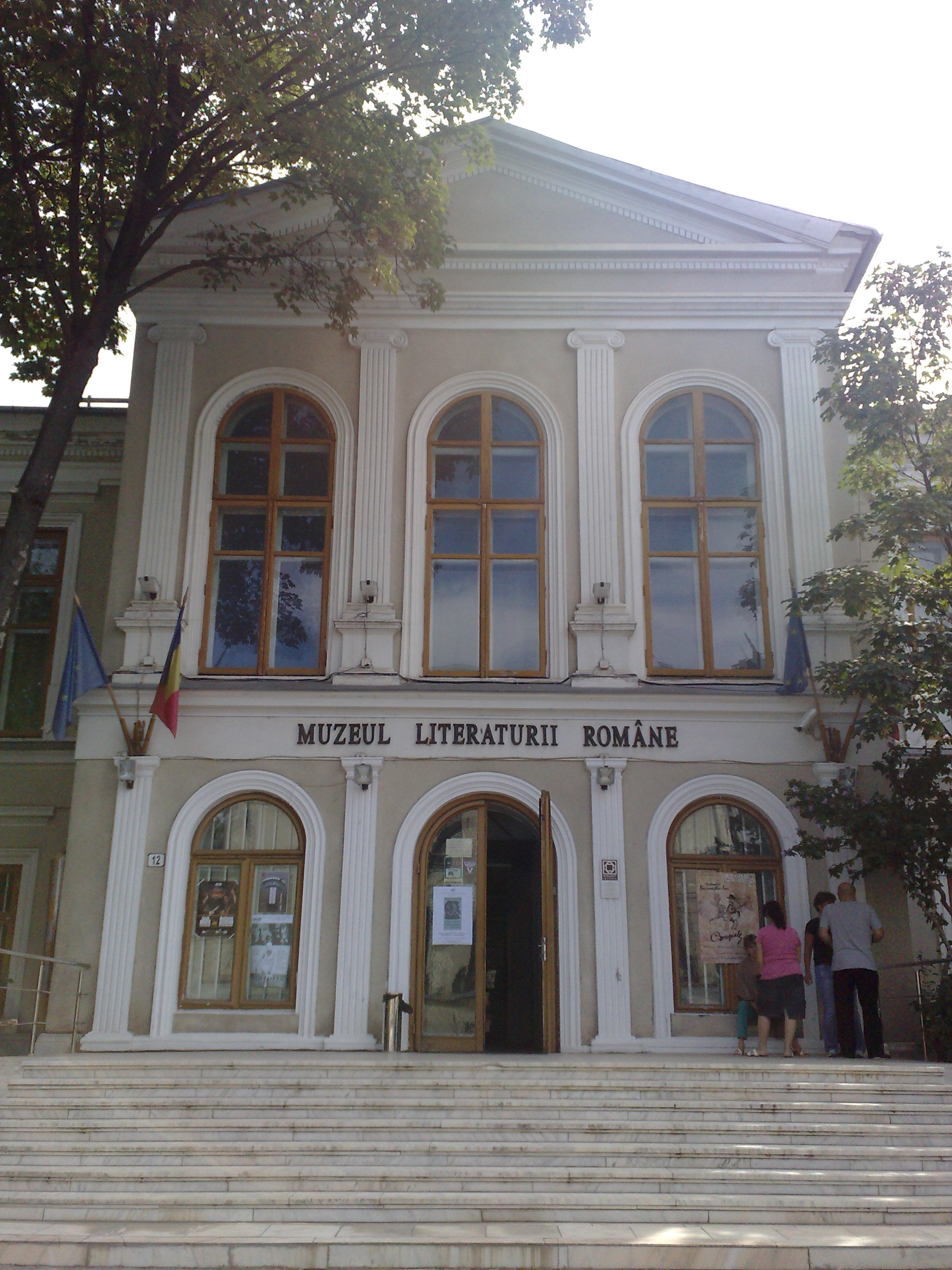 Muzeul literaturii romane